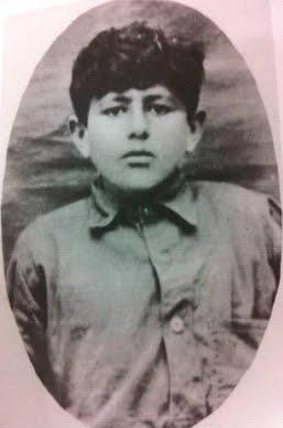 Շնորհք արք. Գալուստյան - Բեյրութի որբանոցում